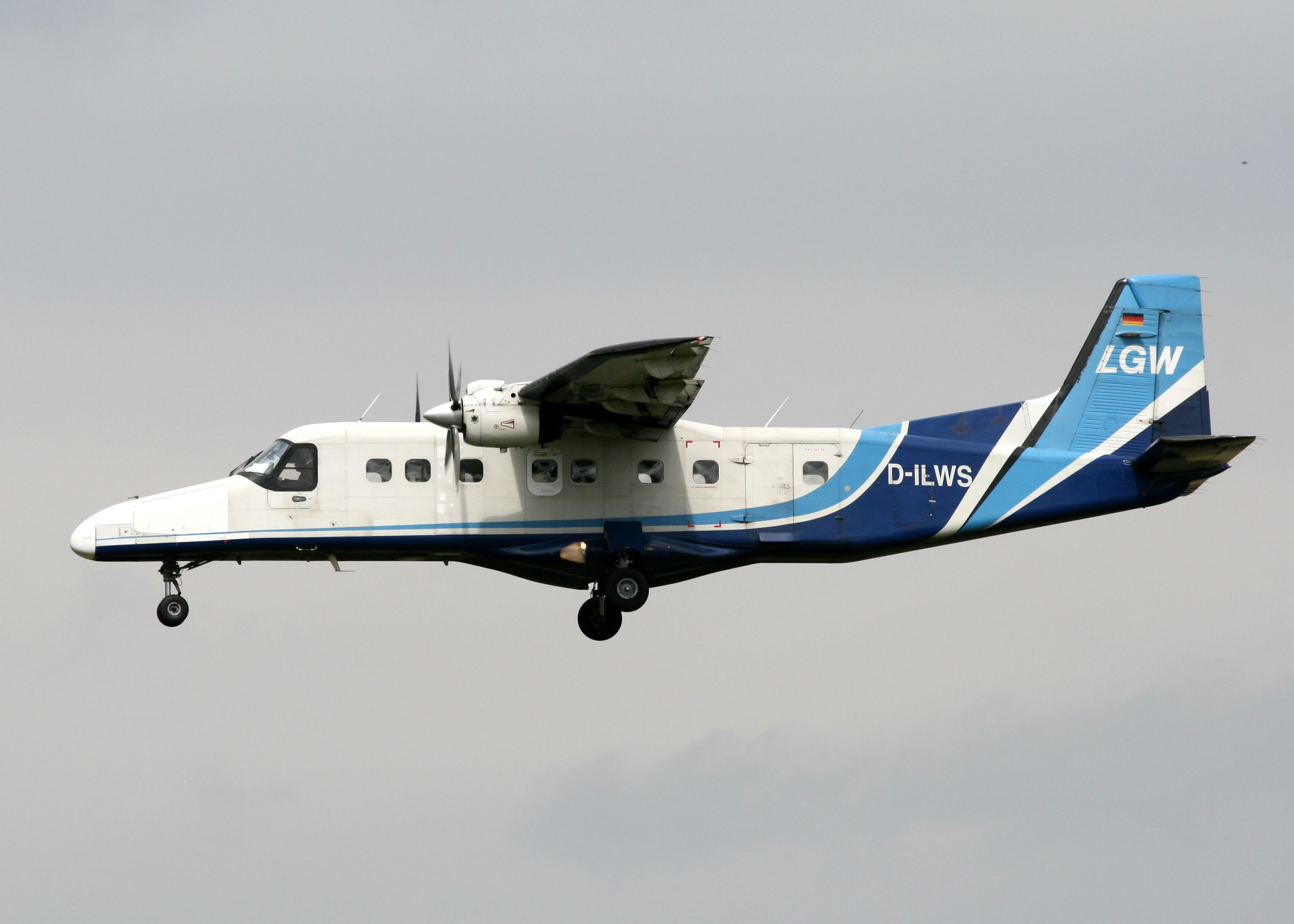 Luftfahrtgesellschaft Walter Dornier 228 landing at Hanover/Langenhagen International Airport